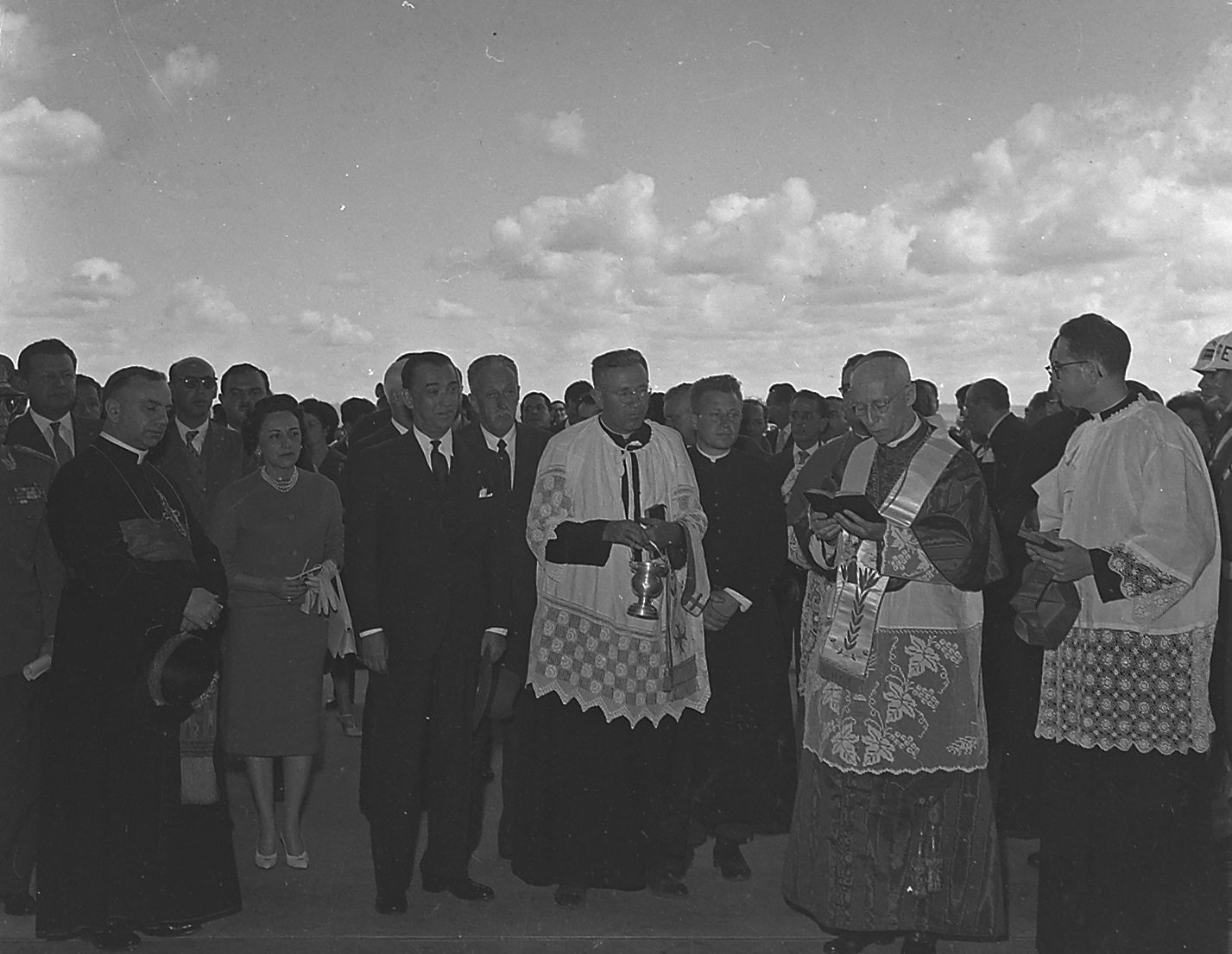 Imagem do Fundo Agência Nacional, do Arquivo Nacional